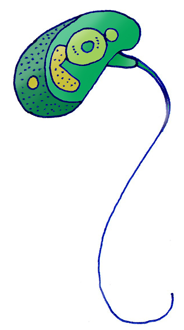 Esquema de Micromonas pusilla by Esv.